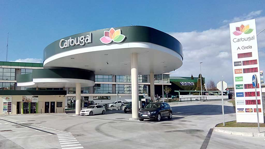 Estación de servizo na Grela.